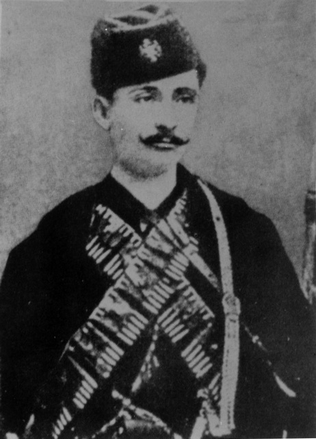 Serbian Chetnik Voivode Voja Tankosić